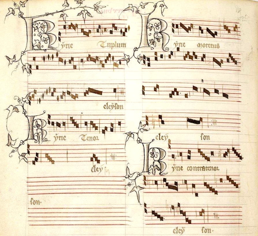 Kyrie da Missa de Notre Dame